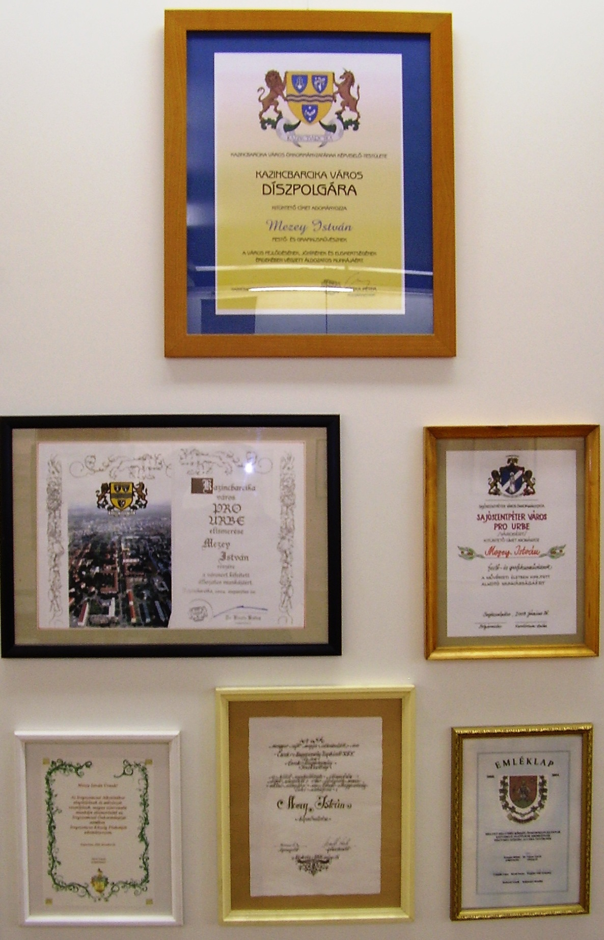 Mezey István festő- és grafikusművész díjaiból, Mezey István Emlékkiállítás (Kazincbarcika, Városi Kiállítóterem)